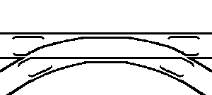 ガントレットの概略図